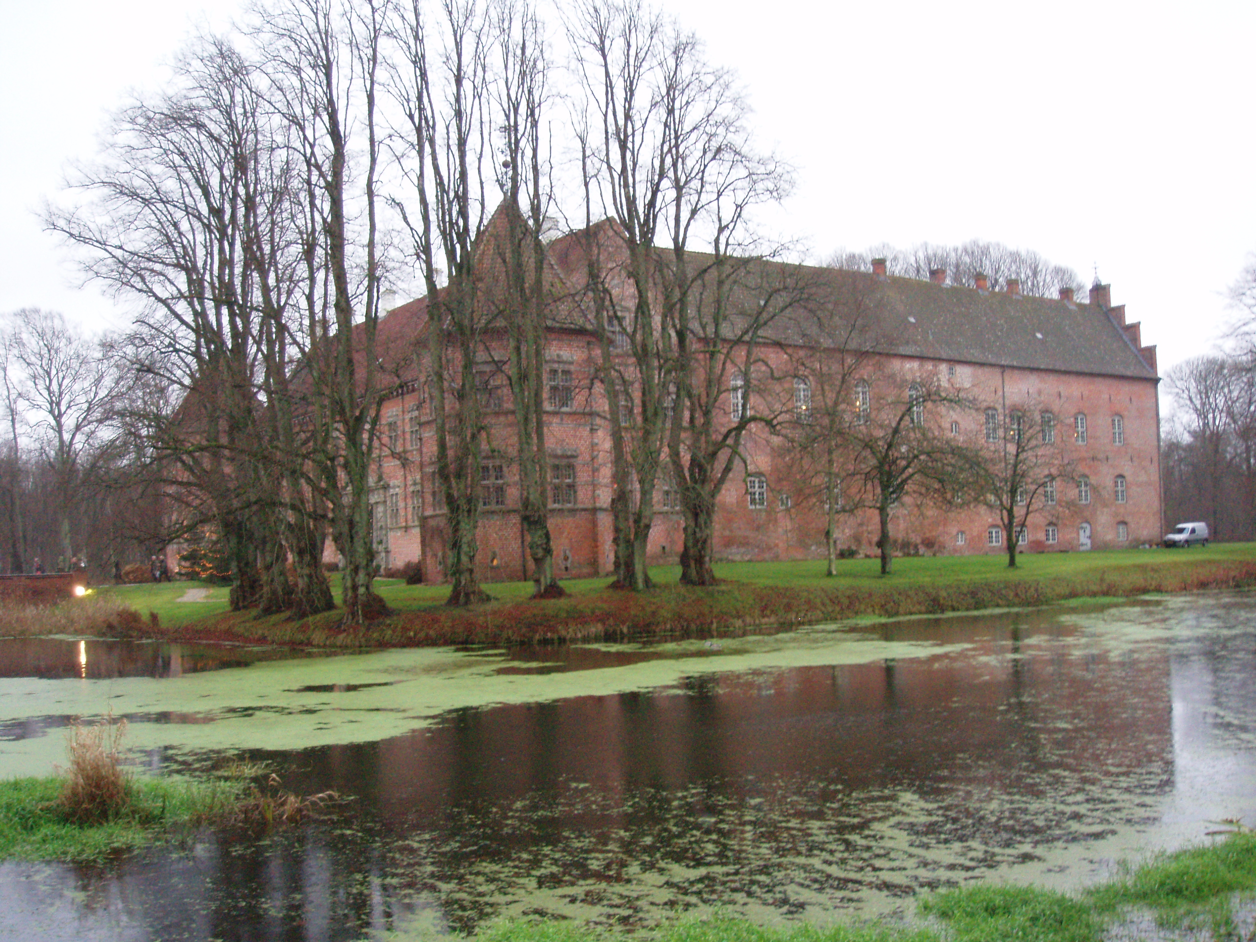 Voergaard Slot i Dronninglund, Danmark